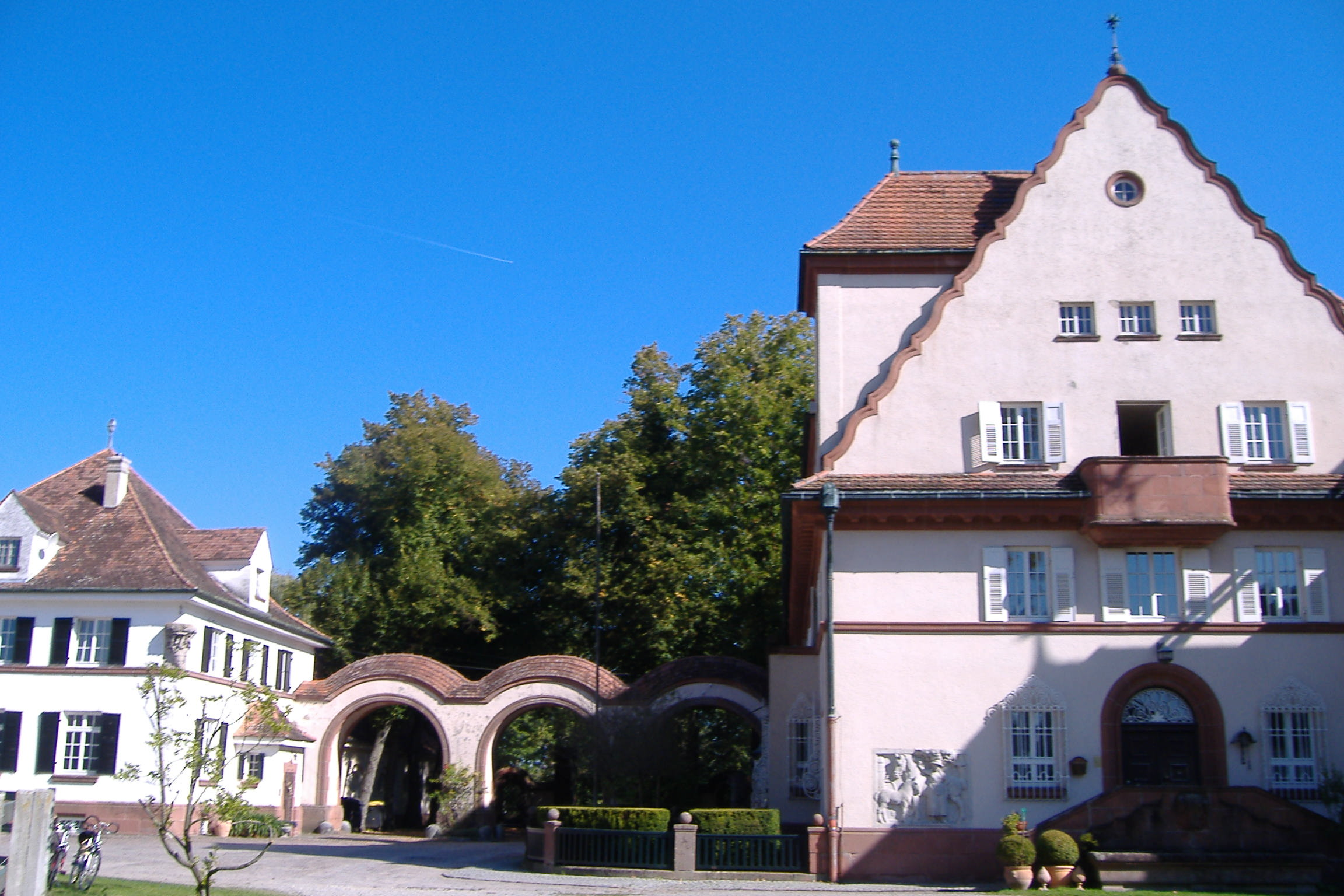 Gut Schwaighof